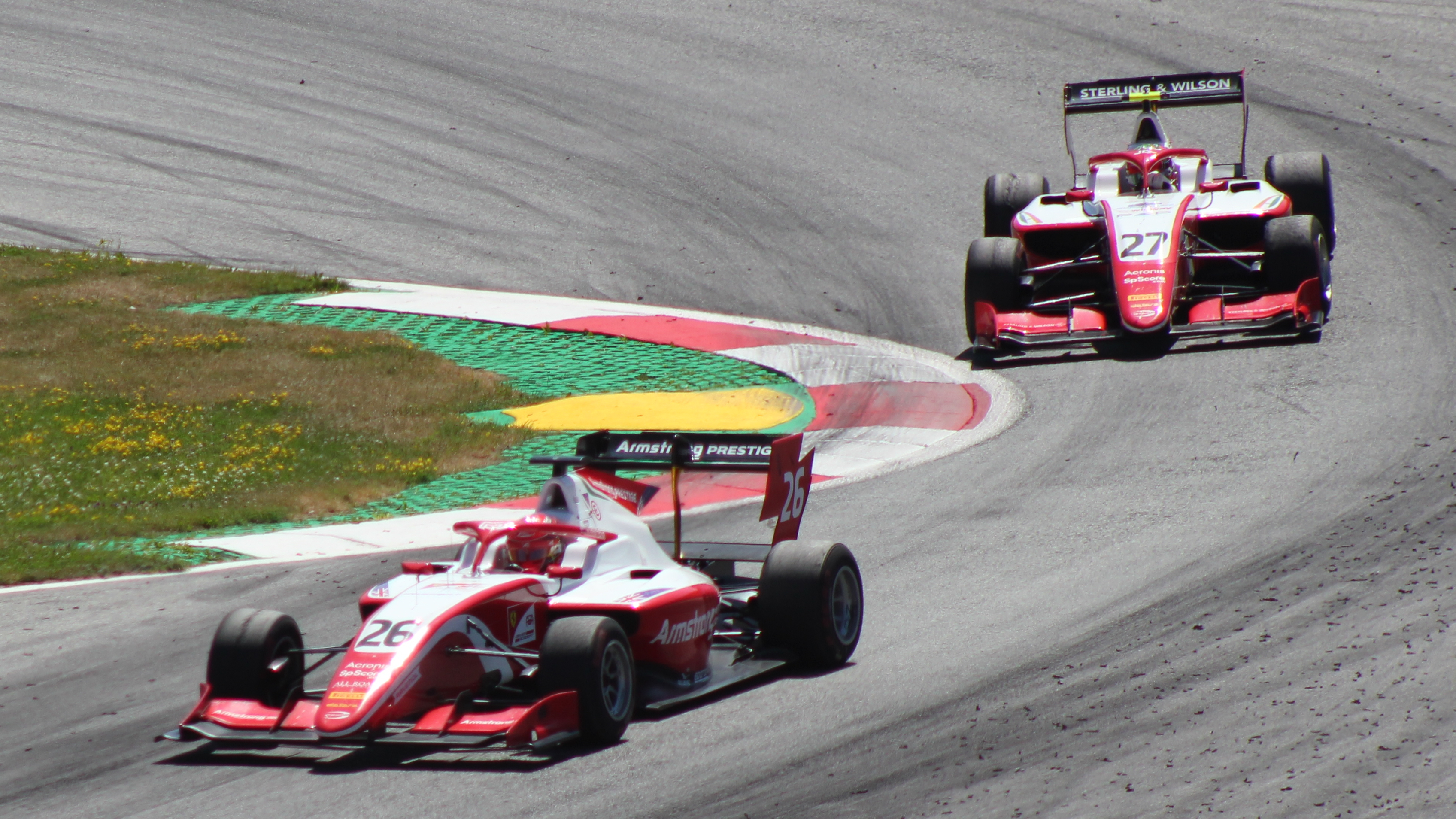 Armstrong beim Rennwochenende in Österreich 2019